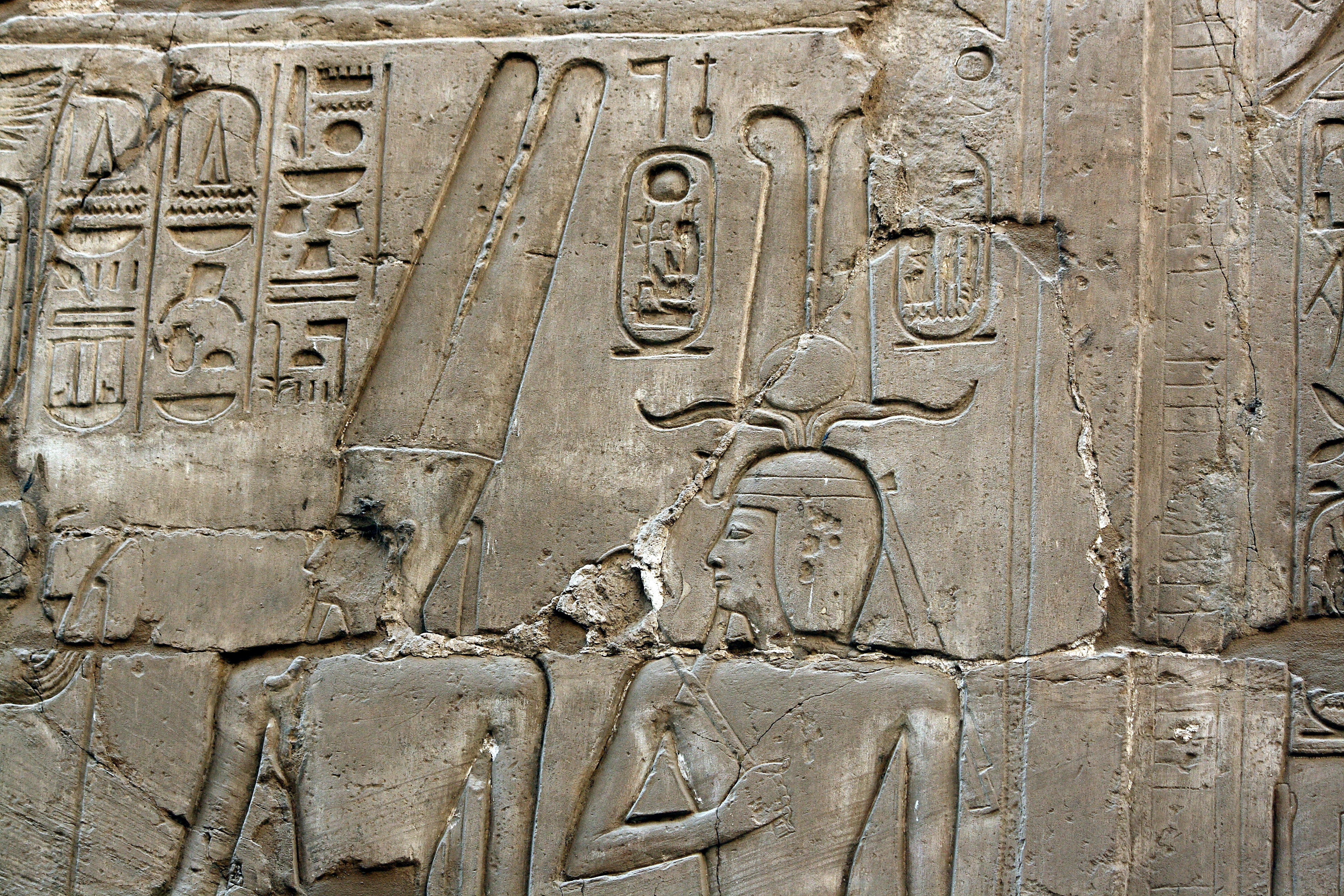 Karnak_temple, Großer_Säulensaal, Relief